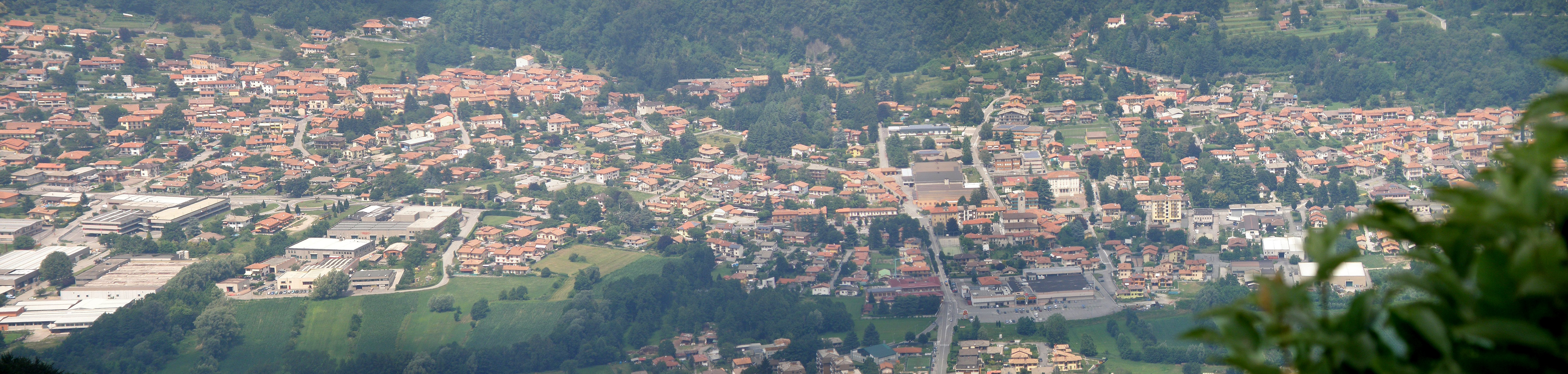 Cuveglio (VA). Vista generale dal forte di Orino sul Campo dei Fiori.